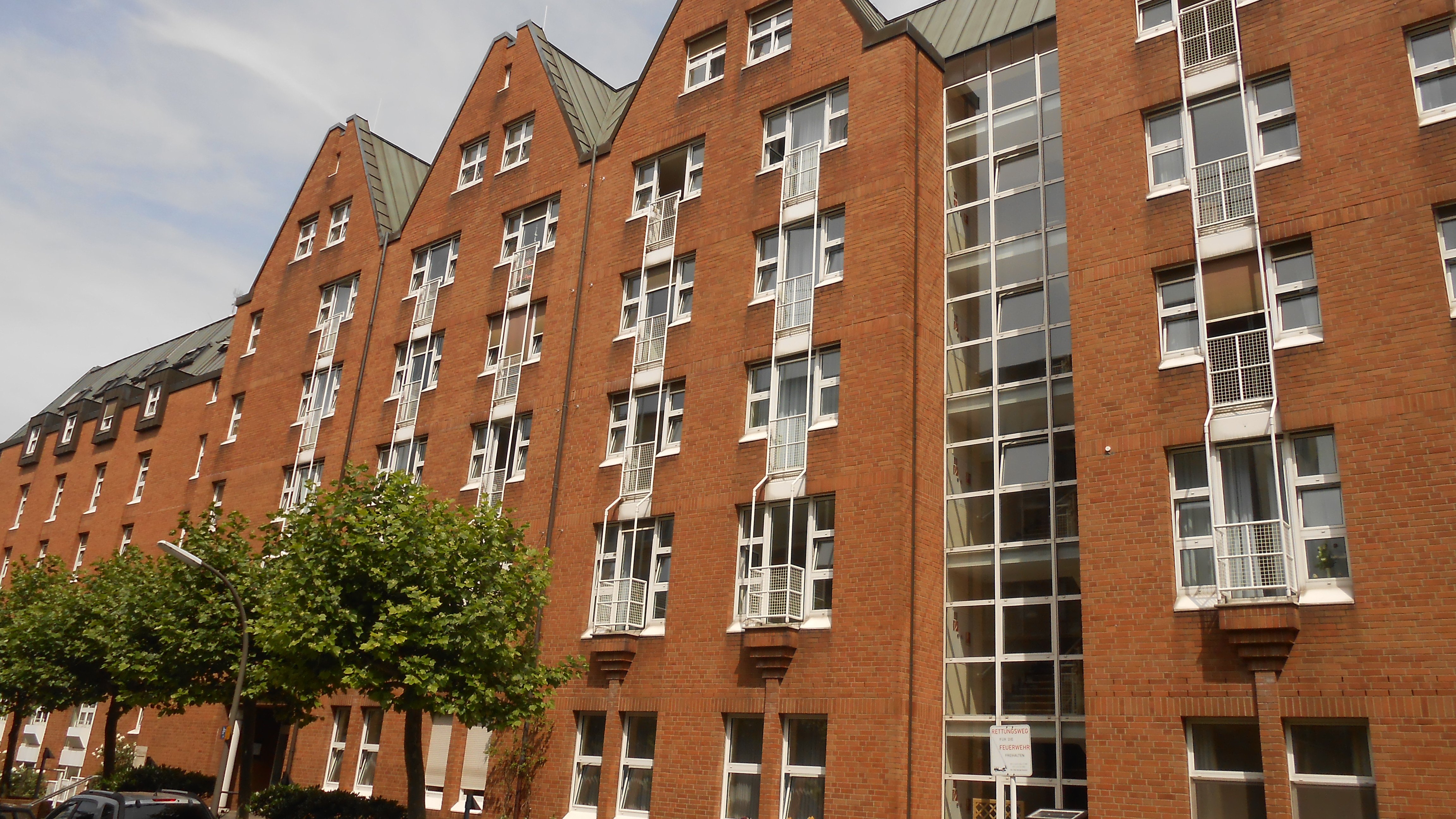 Blick auf das Christinenstift, ein Alten-Pflegeheim in der Dortmunder Innenstadt (Eisenmarkt, nähe Thier Galerie).